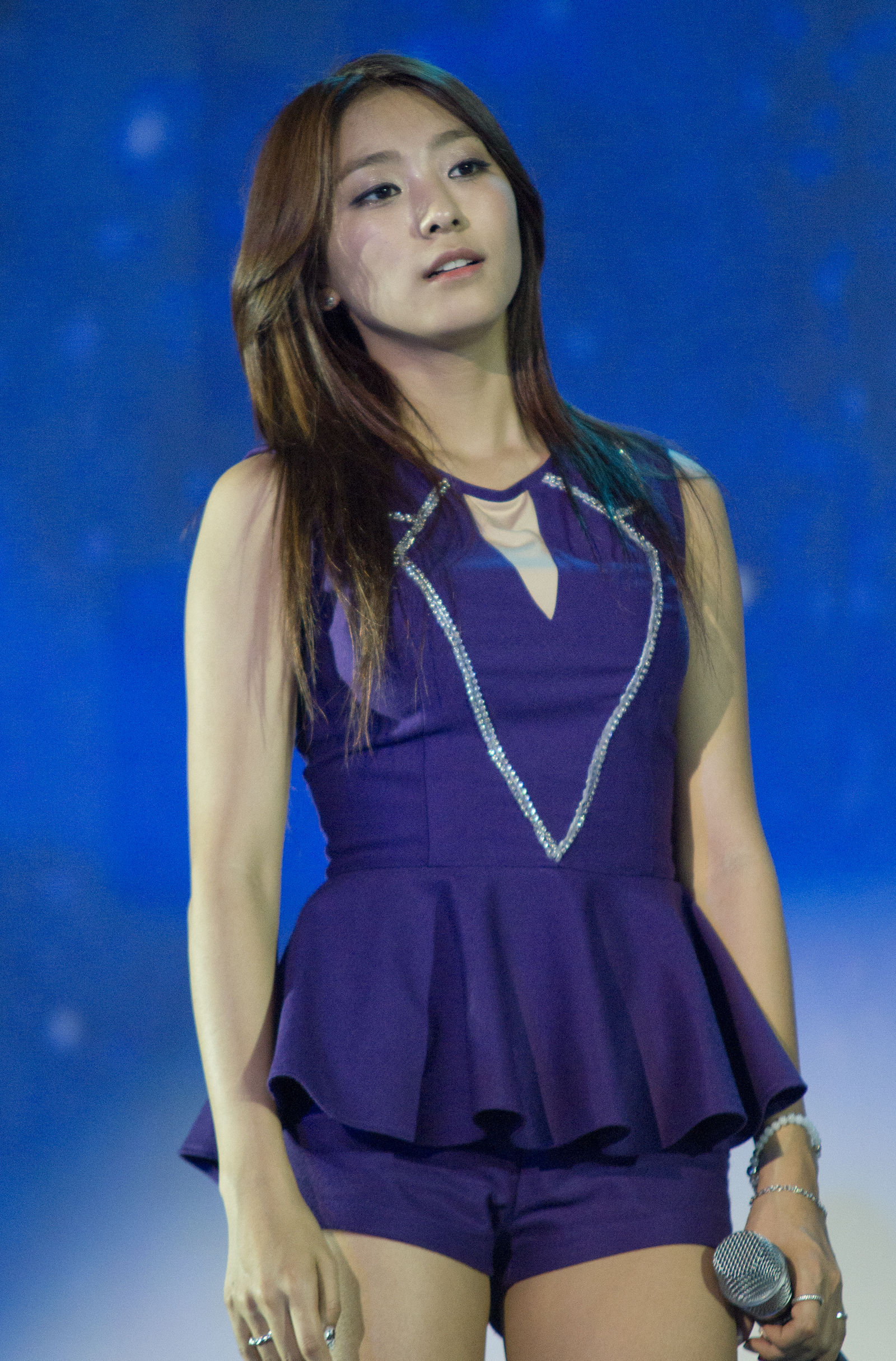 (13.05.19) 메이플스토리 10주년 기념행사 씨스타